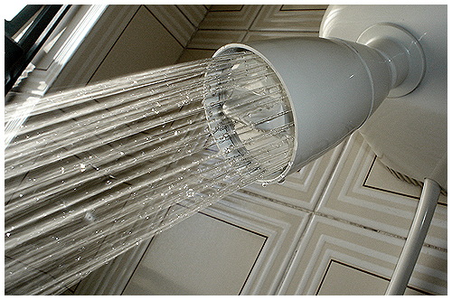 Ducha moderna. 粵語: 沖涼房嘅花灑.